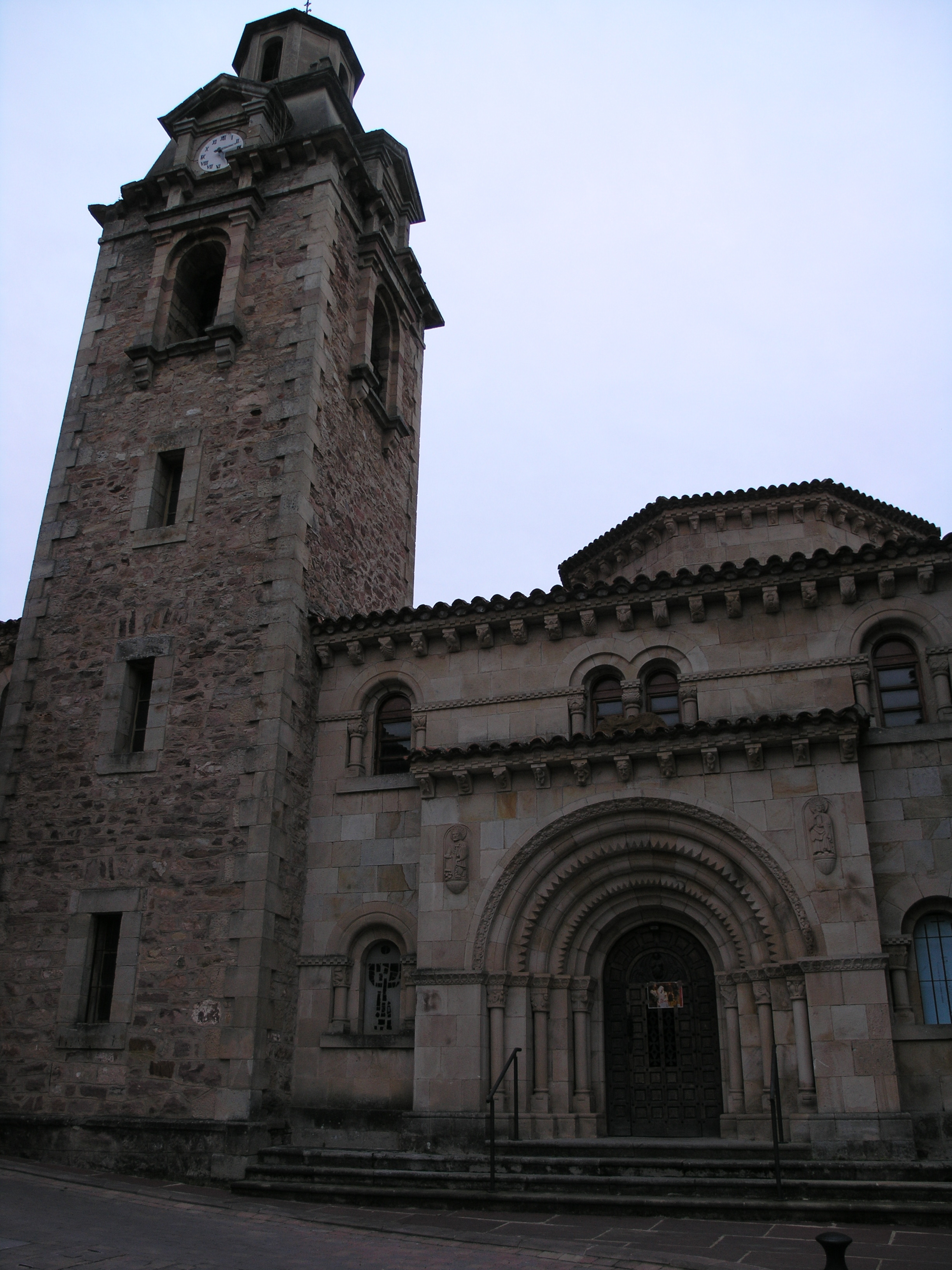 Iglesia de San Miguel, en Puente Viesgo (Cantabria, España). Siglo XVII.